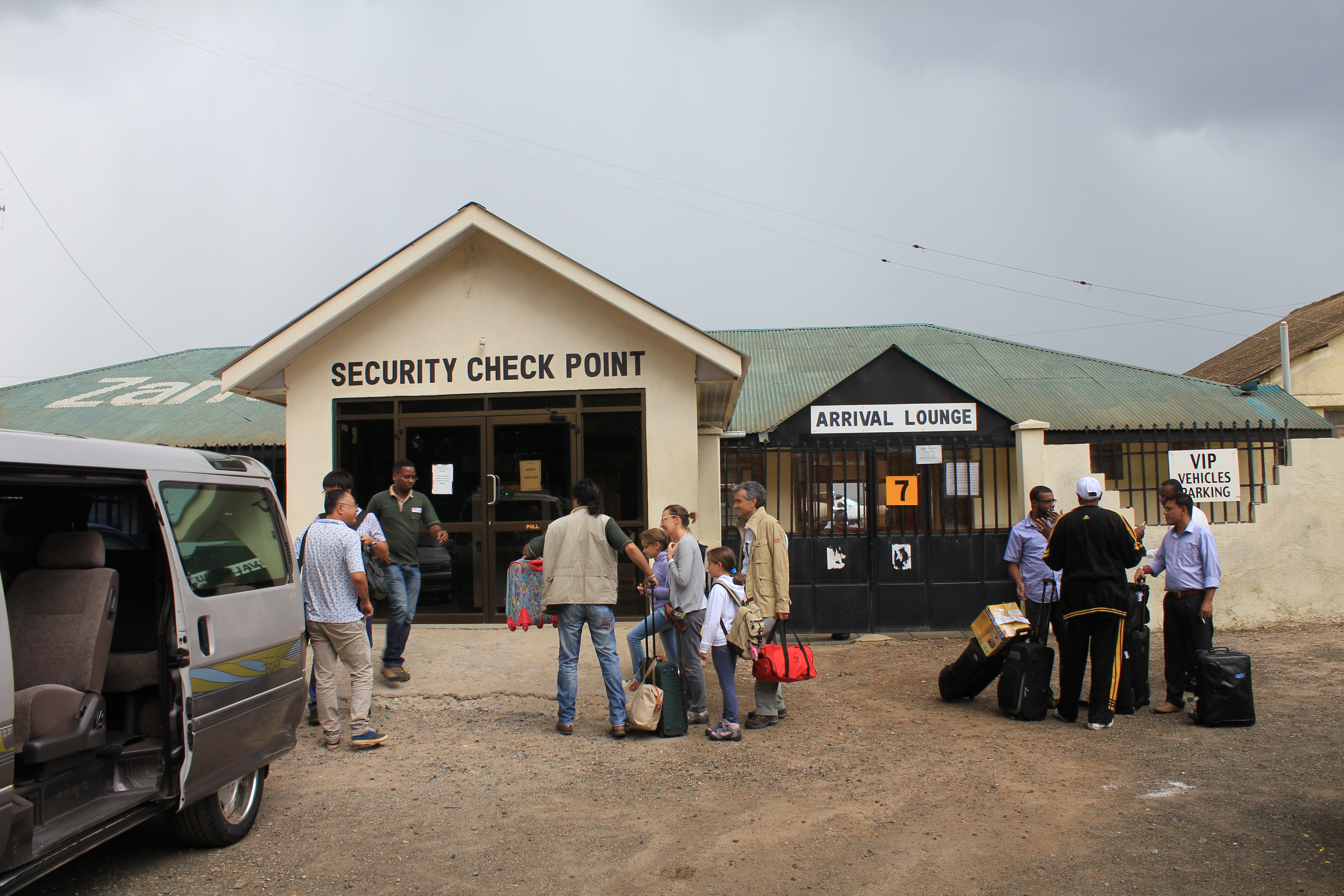 Arusha, Tanzania